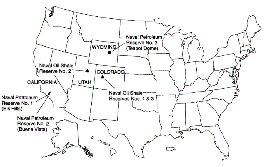 Réserves navales de pétrole et de schiste bitumineux, Département de l’Énergie des États-unies, en 1992